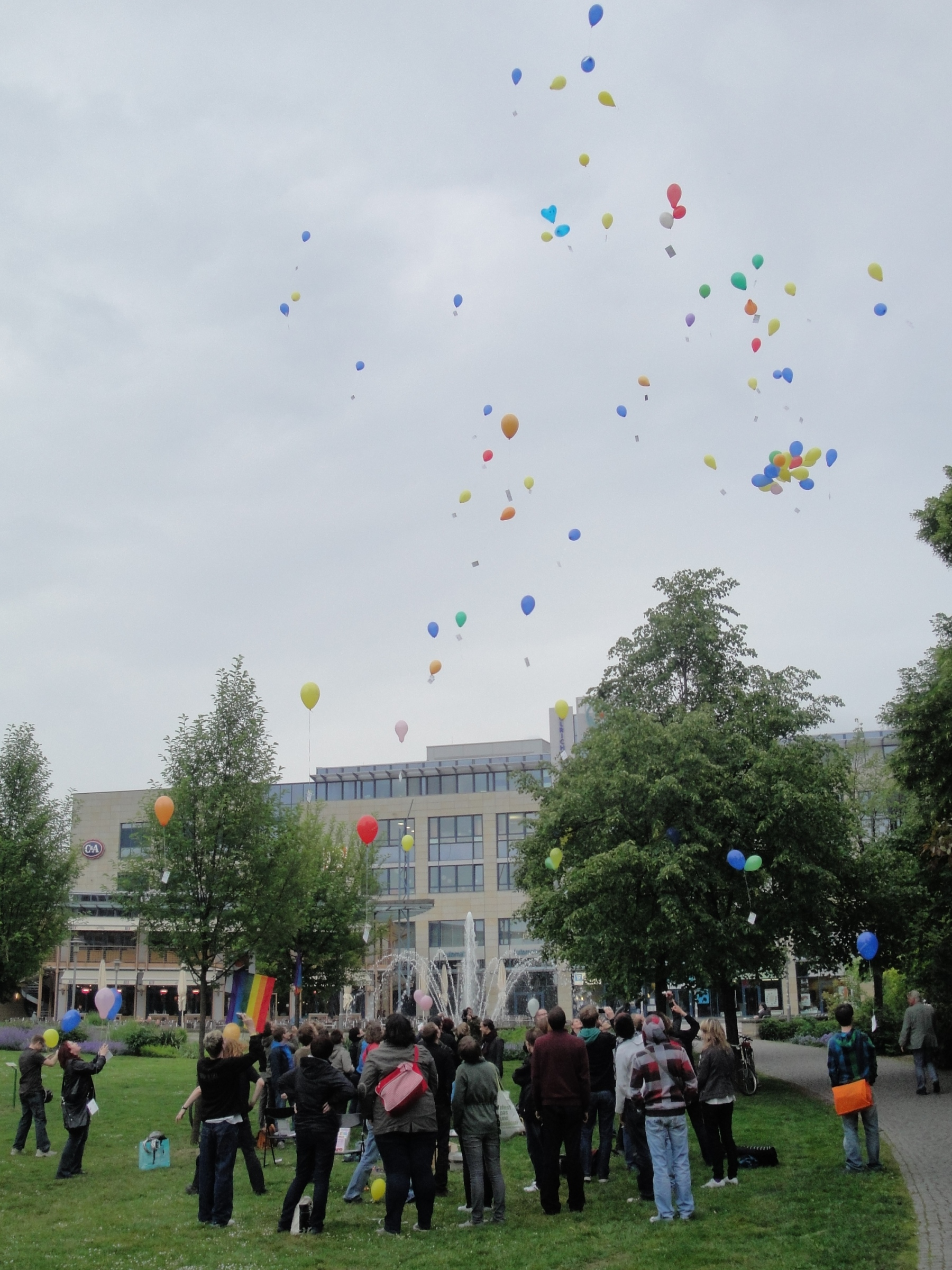 RainbowFlash am 17. Mai 2011 auf dem Ulrichplatz in Magdeburg